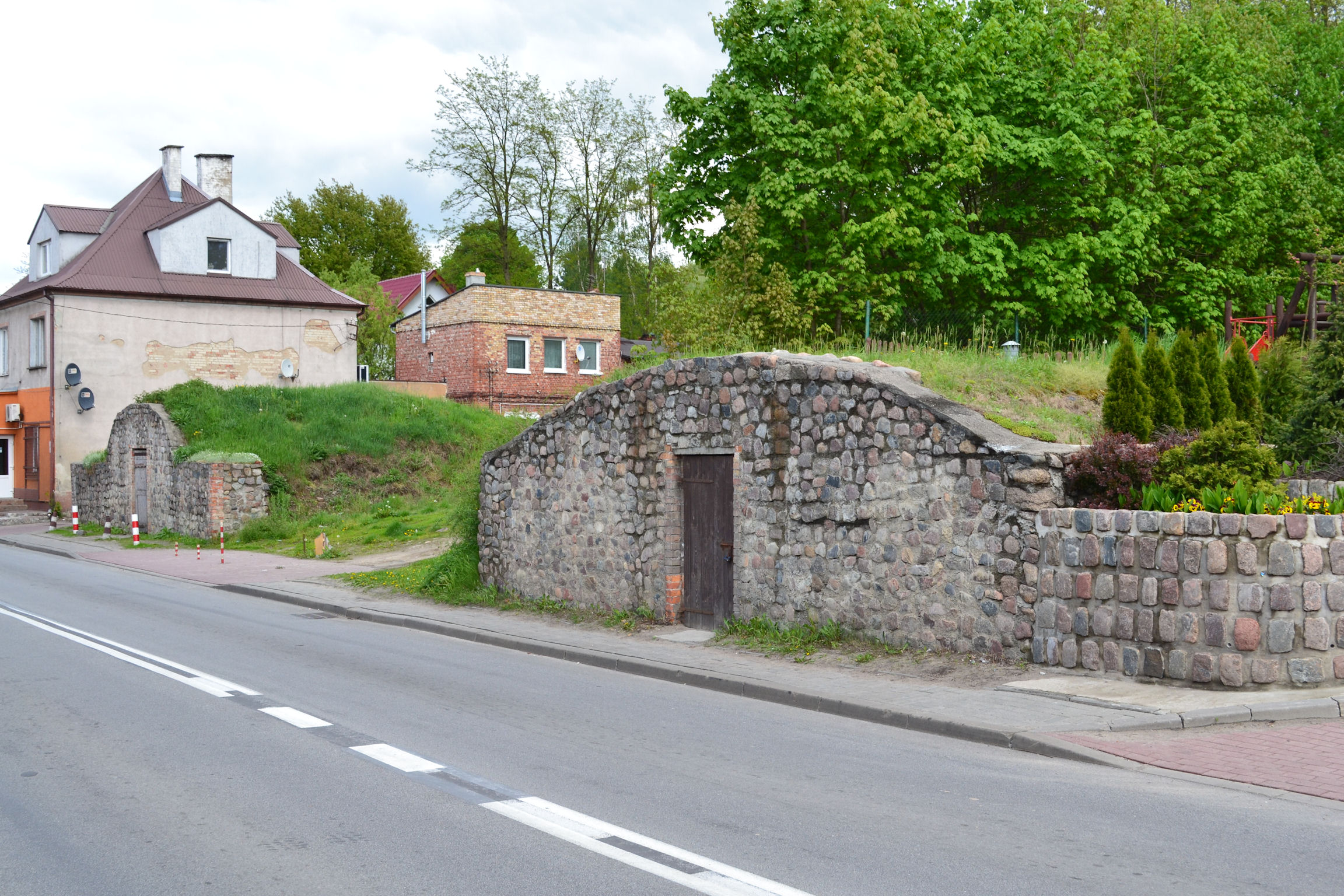 Czepino